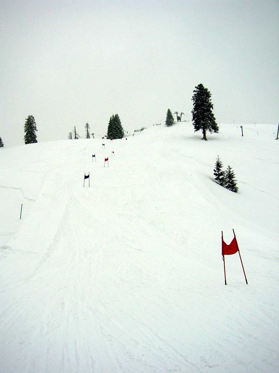 Skitore für Ski-Abfahrtslauf, Sudelfeld (Bayern).